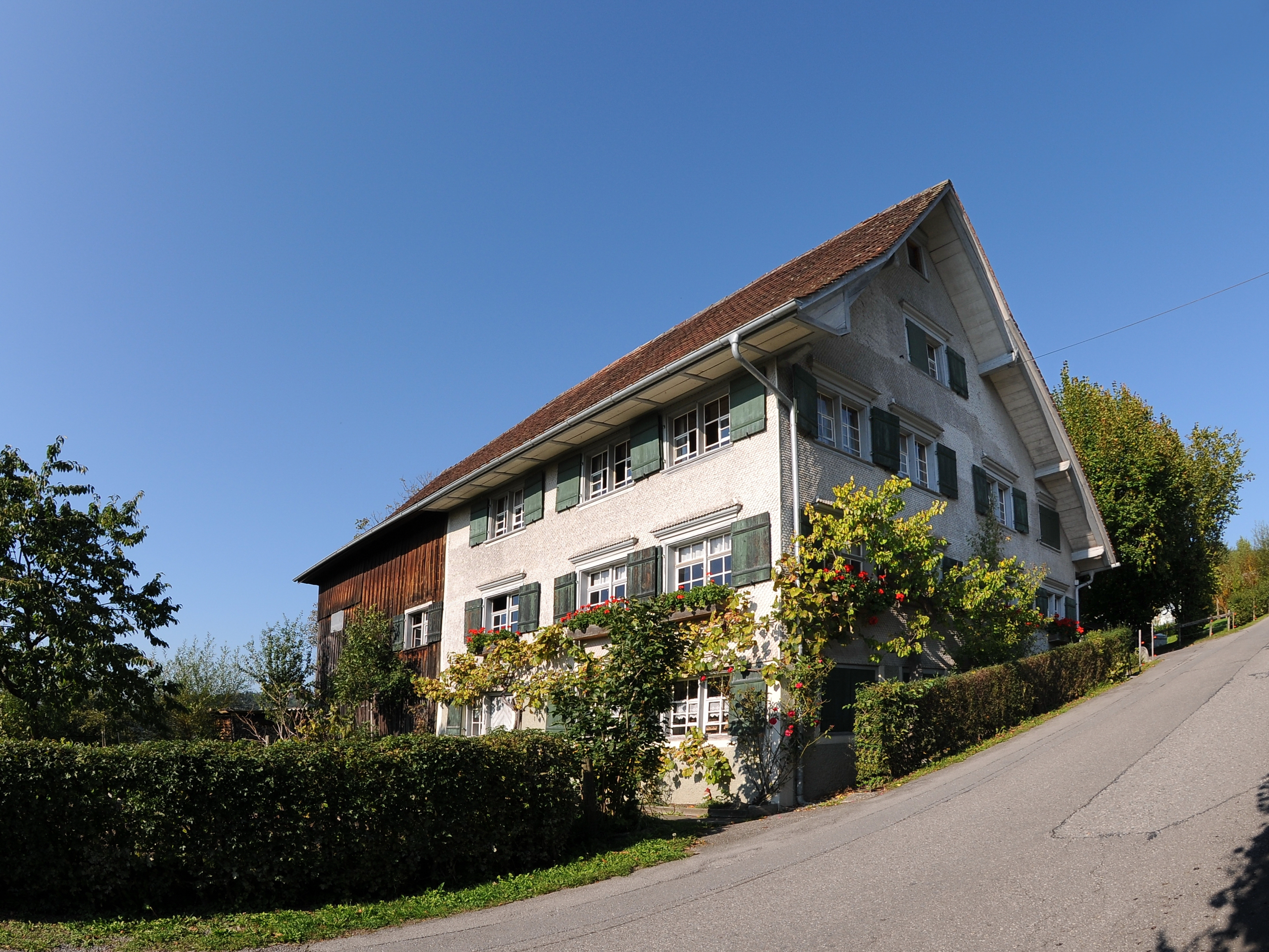 Heimatmuseum, Bauernhof (Anlage), Heimathaus oder Hermann-Dür-Haus am Linzenberg 129 in Schwarzach.